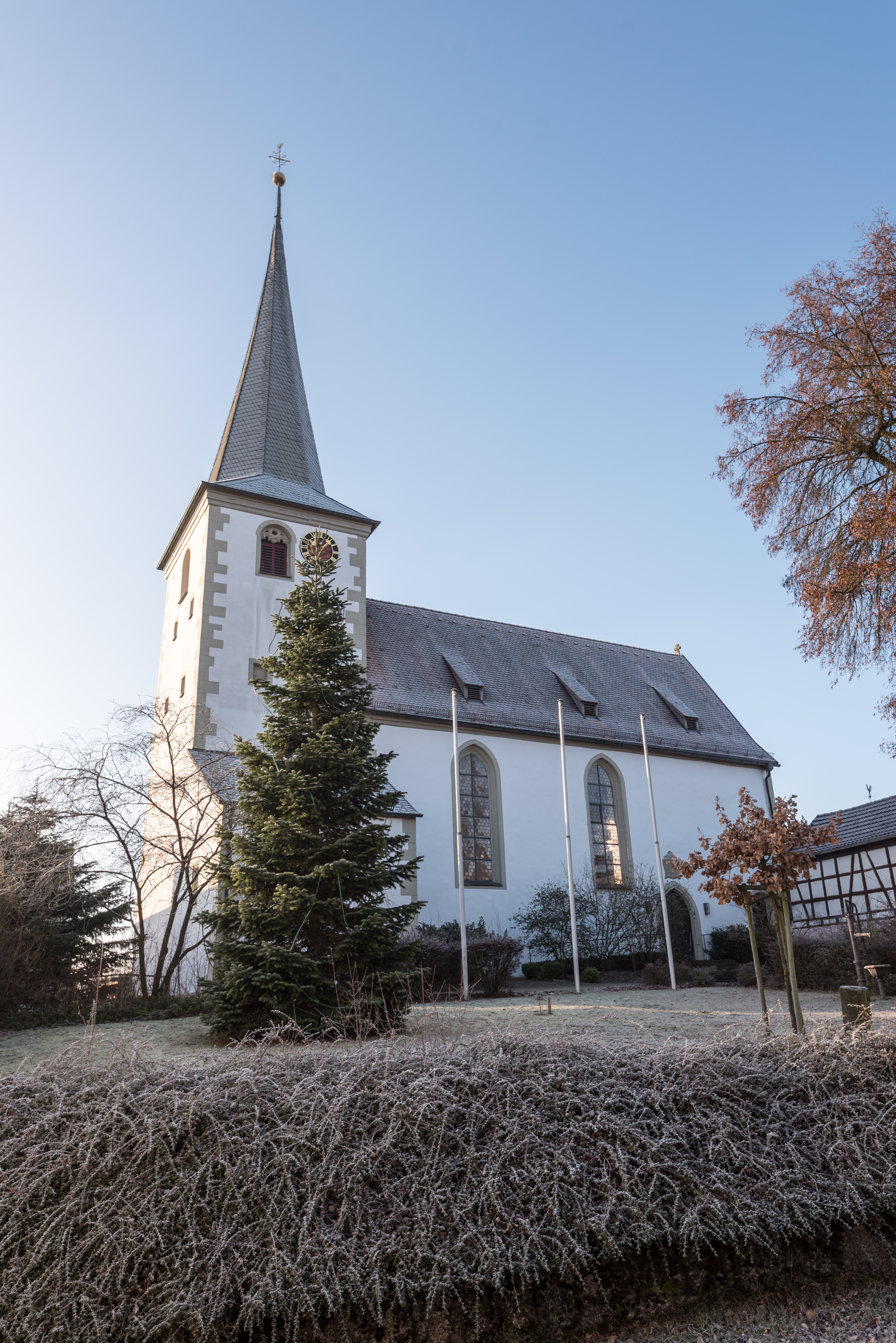 Üchtelhausen, Ebertshausen, Kath. Pfarrkirche St. Margaretha